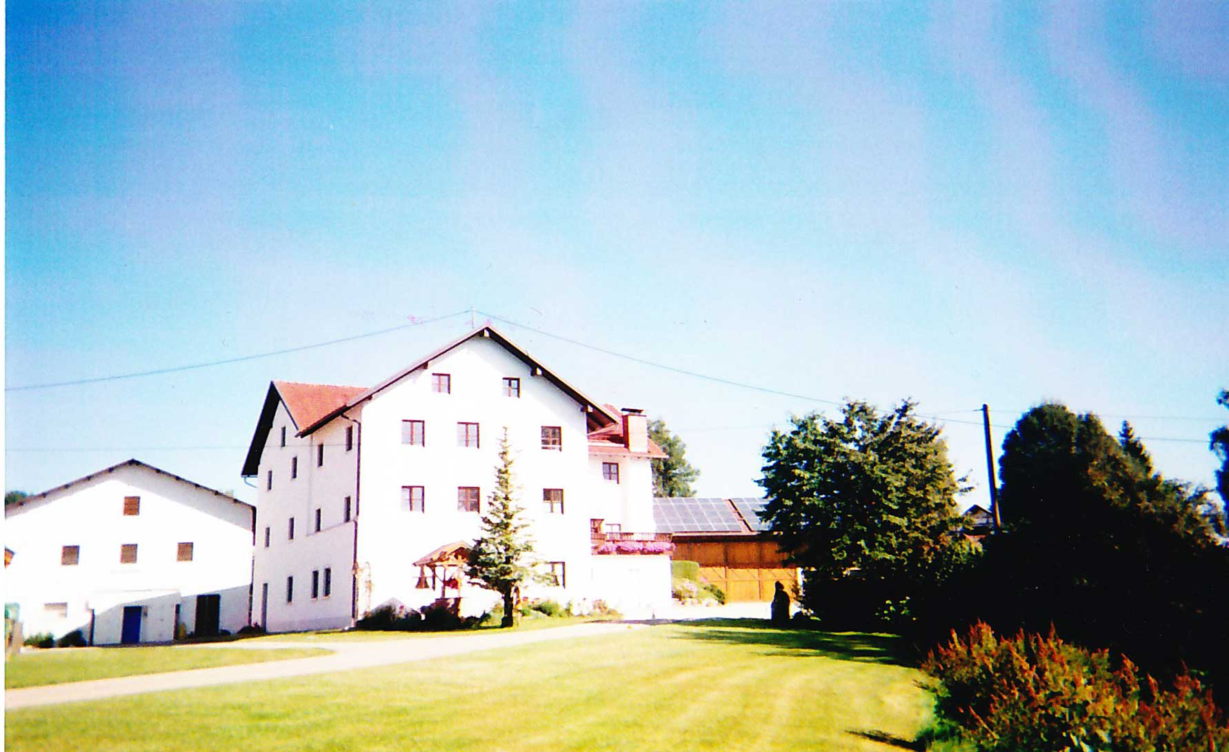 Ehemaliges Schloss Wasentegenbach von Süden